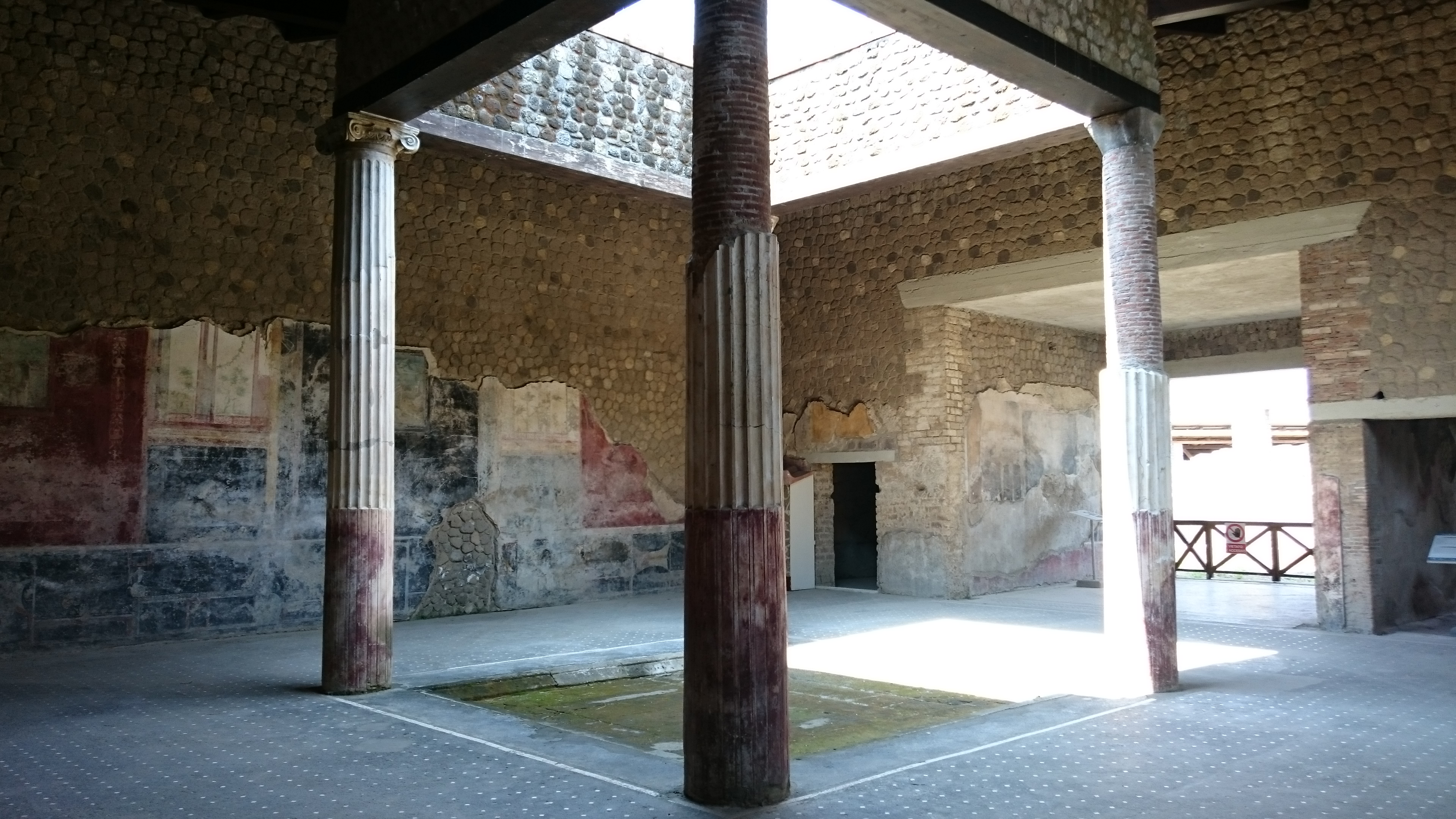 Villa San Marco, Stabia - MIBAC This is a photo of a monument which is part of cultural heritage of Italy.